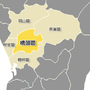 橋頭區相對位置